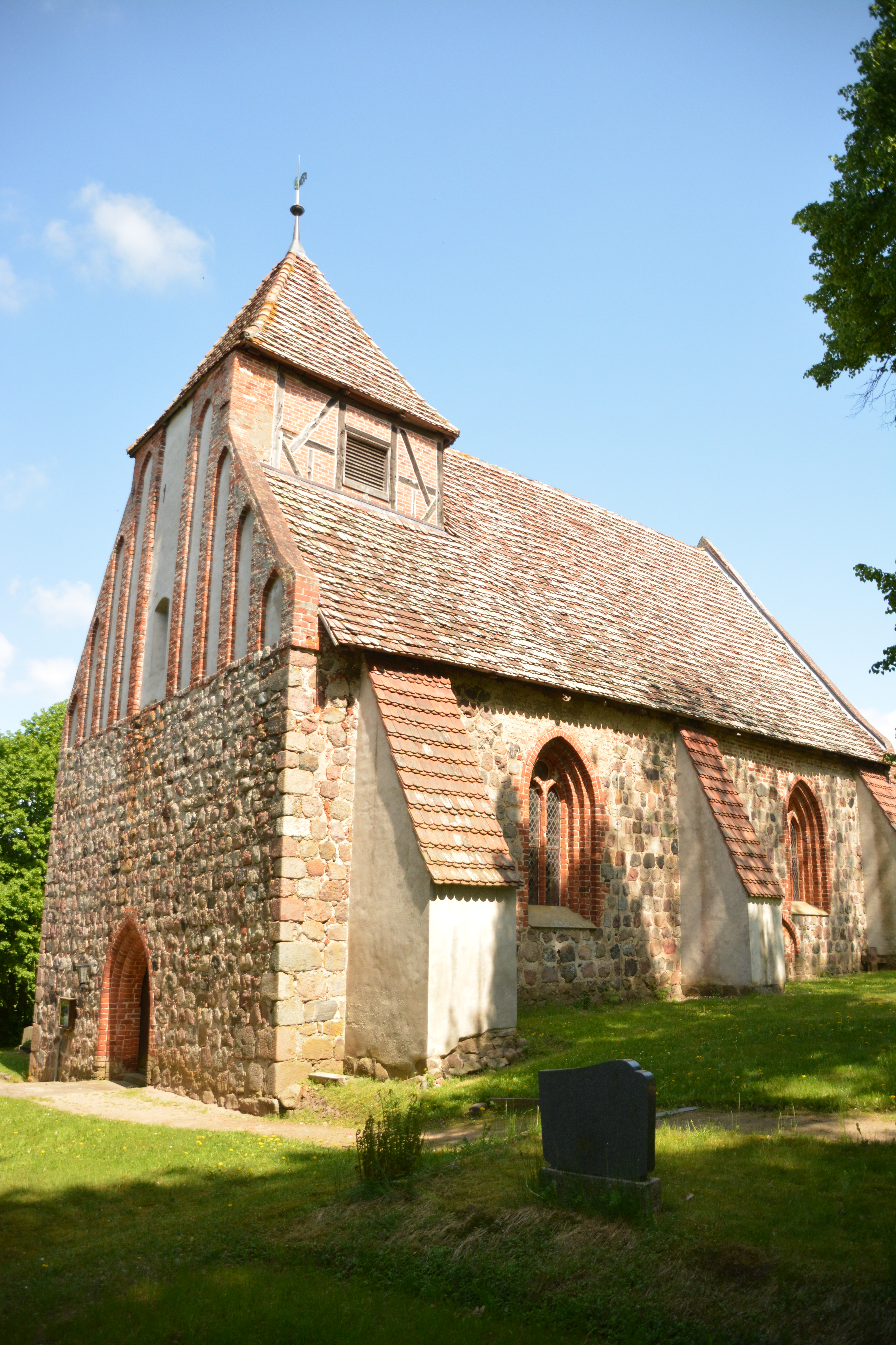 Dorfkirche Badendiek Südwestansicht